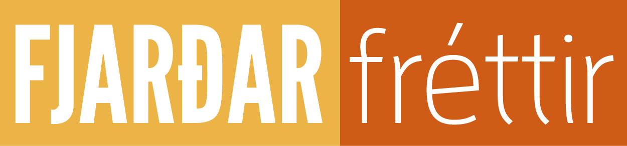 Merki Fjarðarfrétta frá 2016